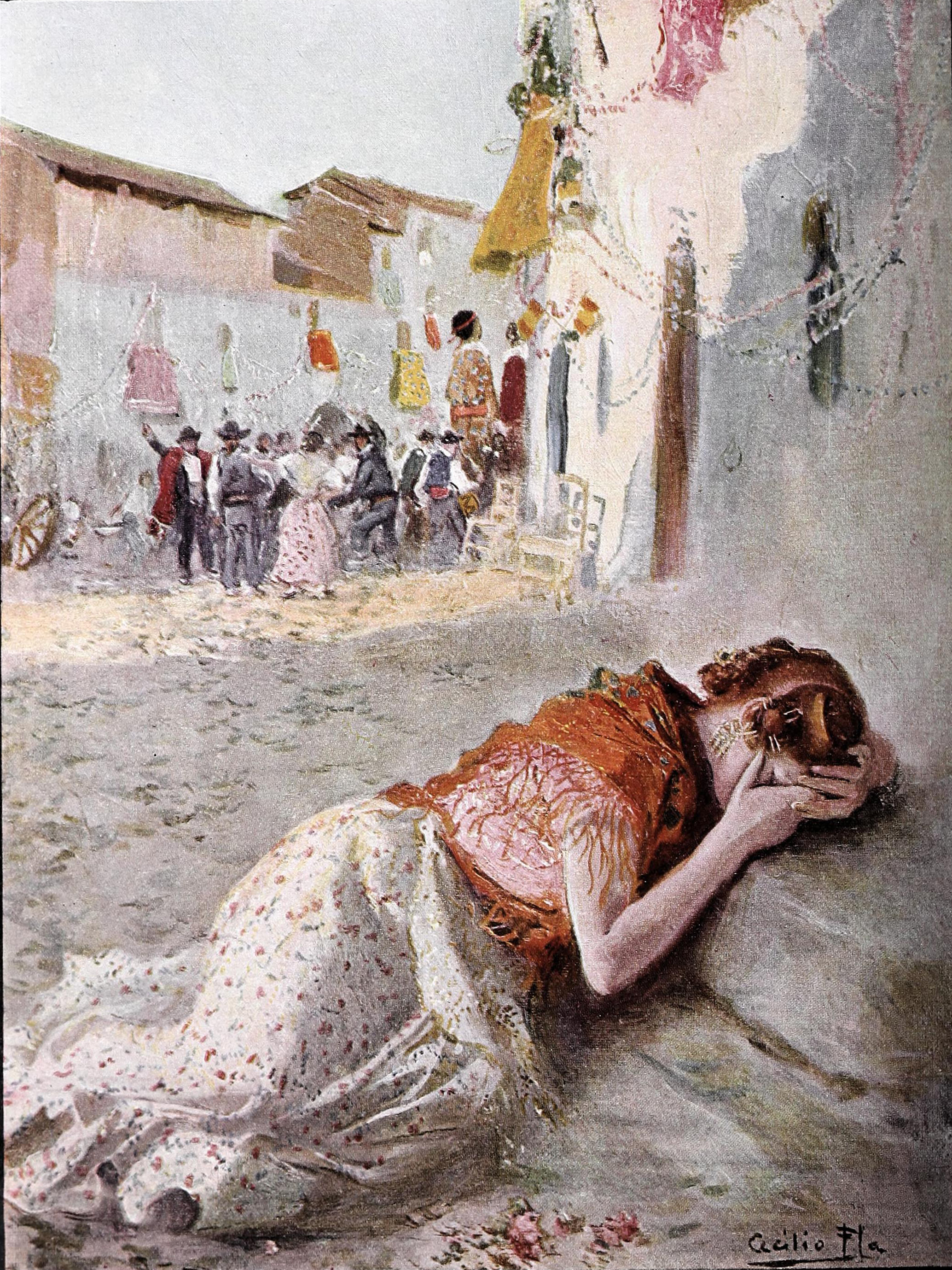 Figuras teatrales. Doloretes.